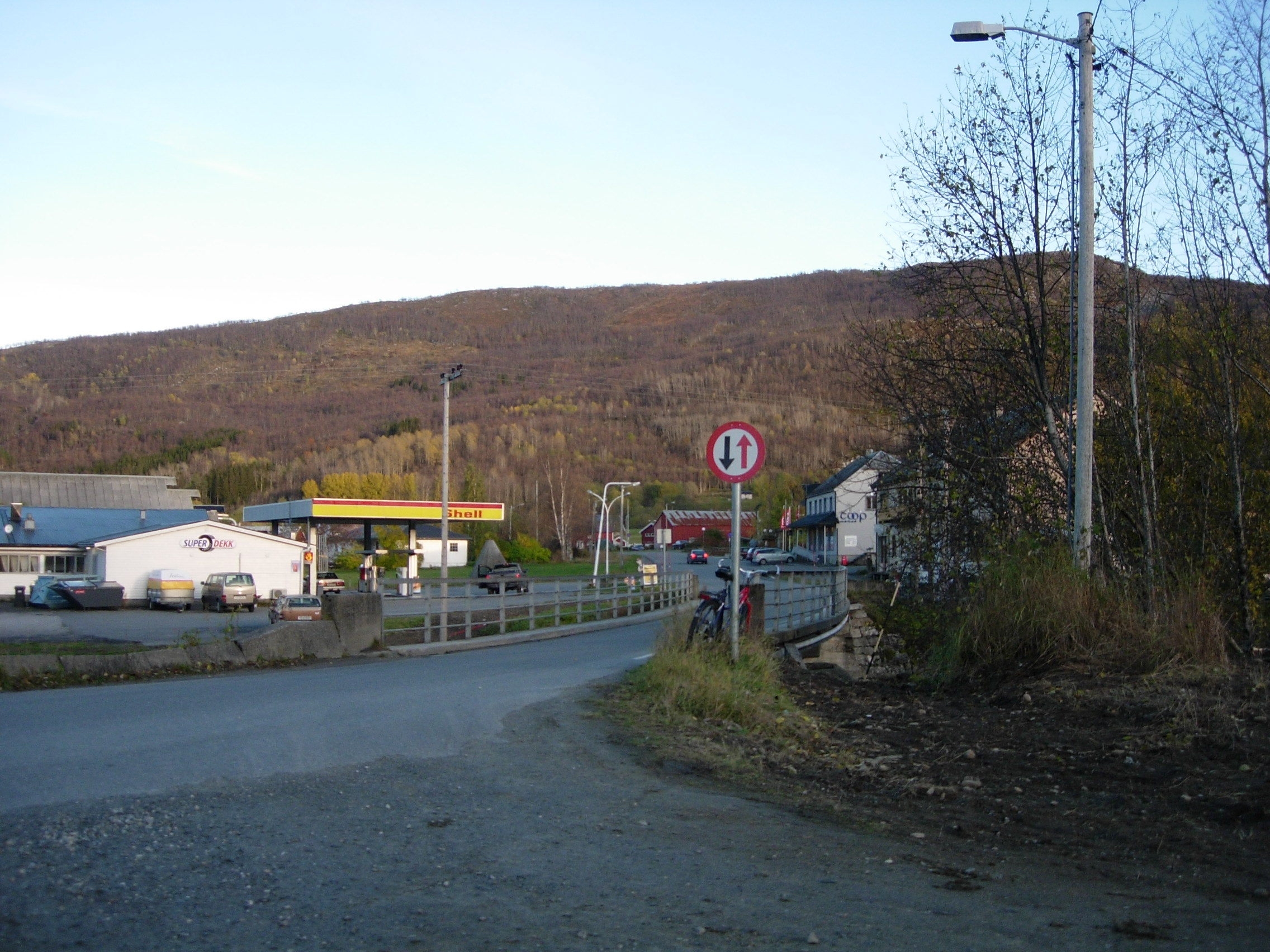 Misvær, Bodø, Norway